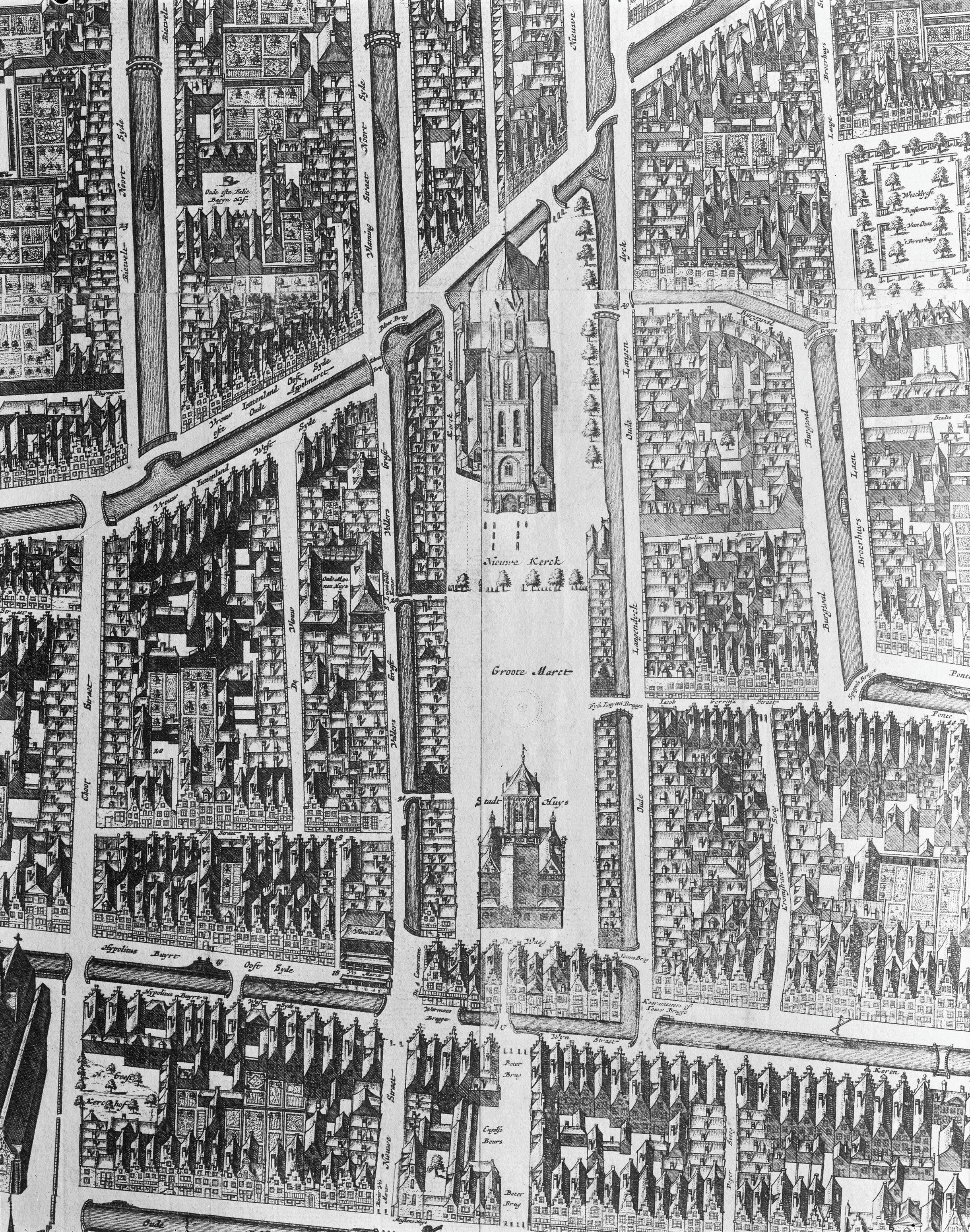 Plattegronden en Overzichten: kaart figuratief, detail, in bezit van prof. Wegeners Sleeswijk, Amsterdam